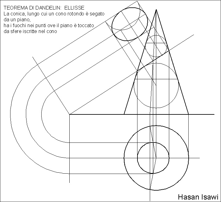 TEOREMA DI DANDELIN: ELLISSE La conica, lungo cui un cono rotondo è segato da un piano, ha i fuochi nei punti ove il piano è toccato da sfere iscritte nel cono